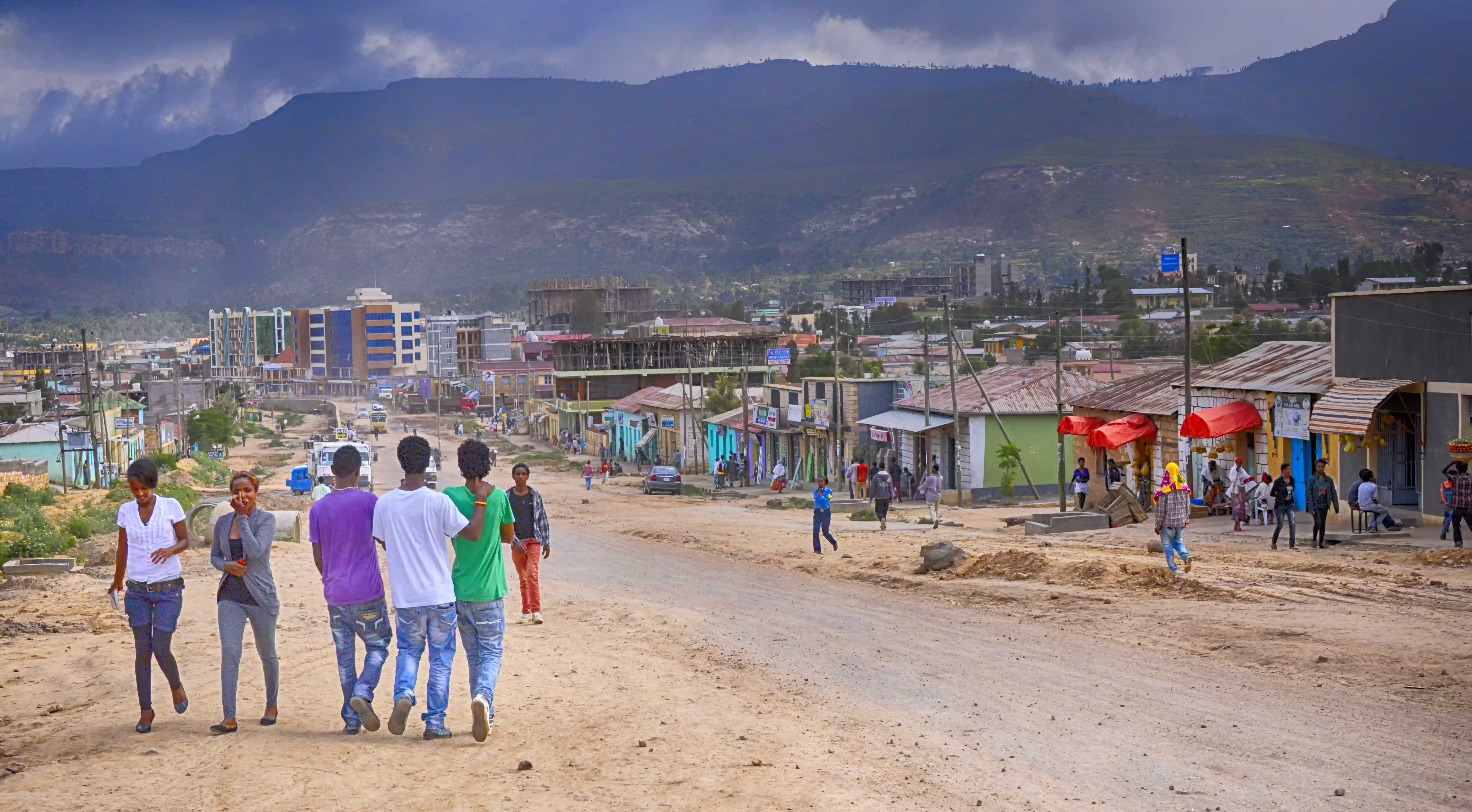 Ethiopia